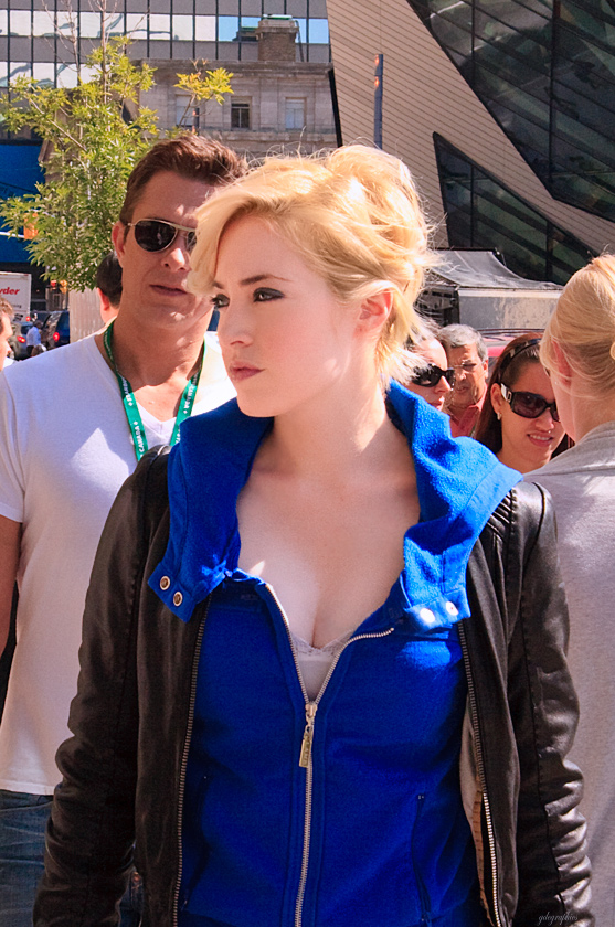 Toronto International Film Festival 2009.